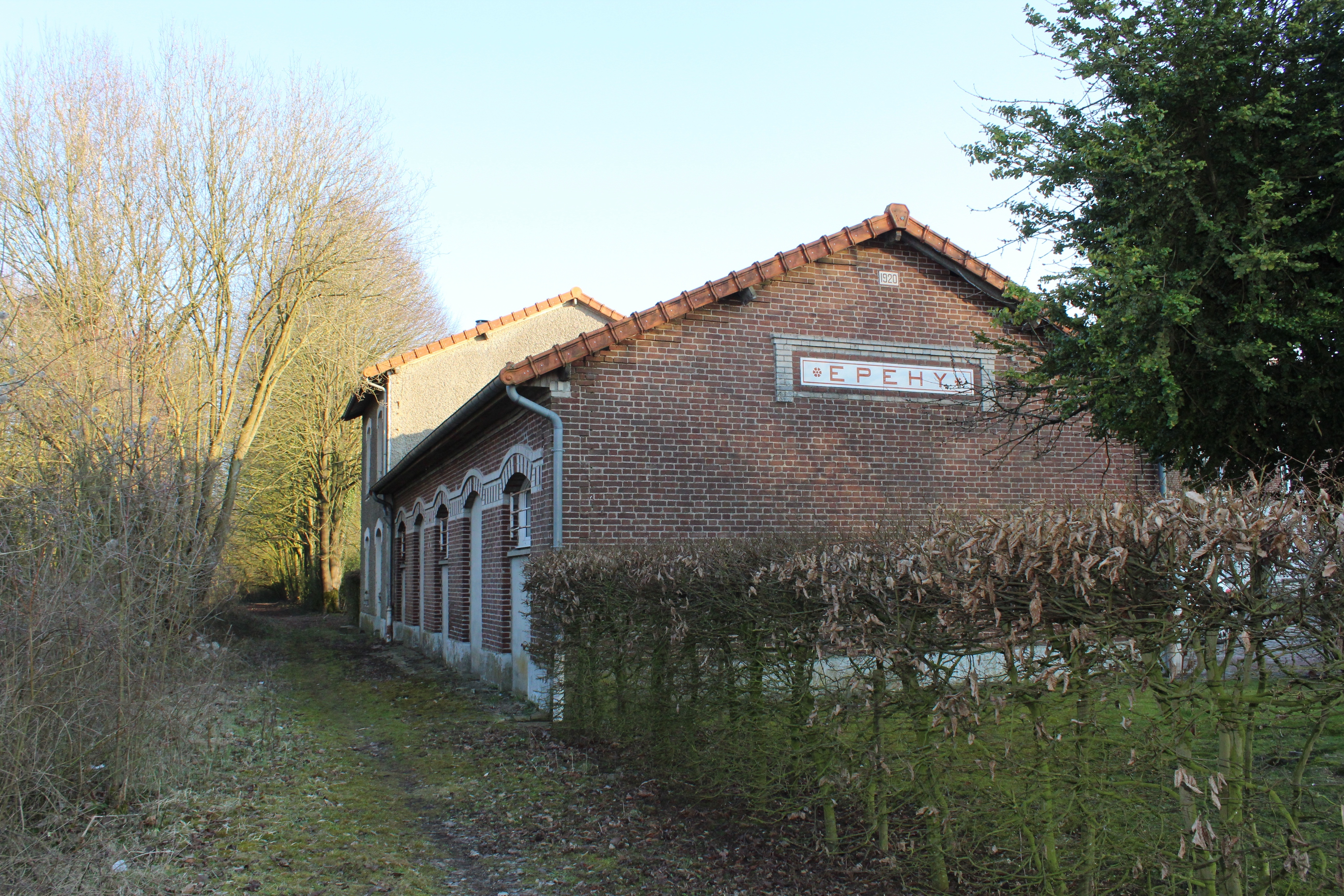 L'ancienne gare.